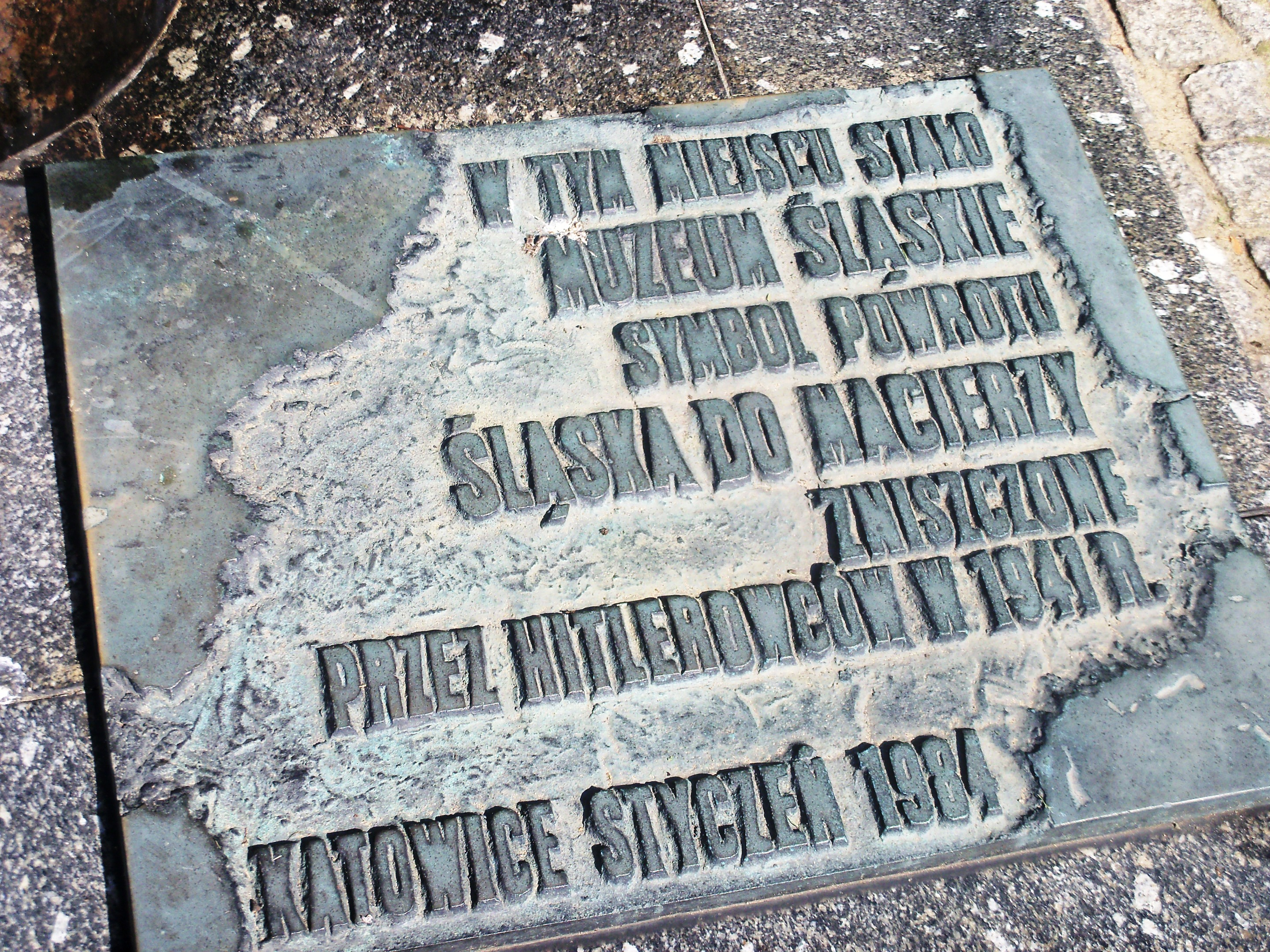 Obelisk Orłów Śląskich w Katowicach - płuta pamiątkowa, na placu Bolesława Chrobrego